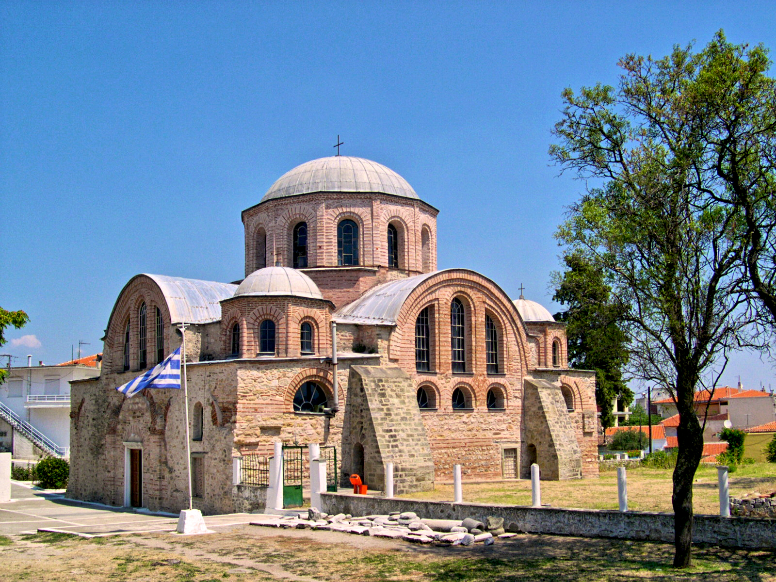 ο Ναός της Παναγίας Κοσμοσώτειρας στις Φέρες, Καθολικό της πάλαι ποτέ Ιεράς Μονής Παναγίας Κοσμοσώτειρας Βήρας